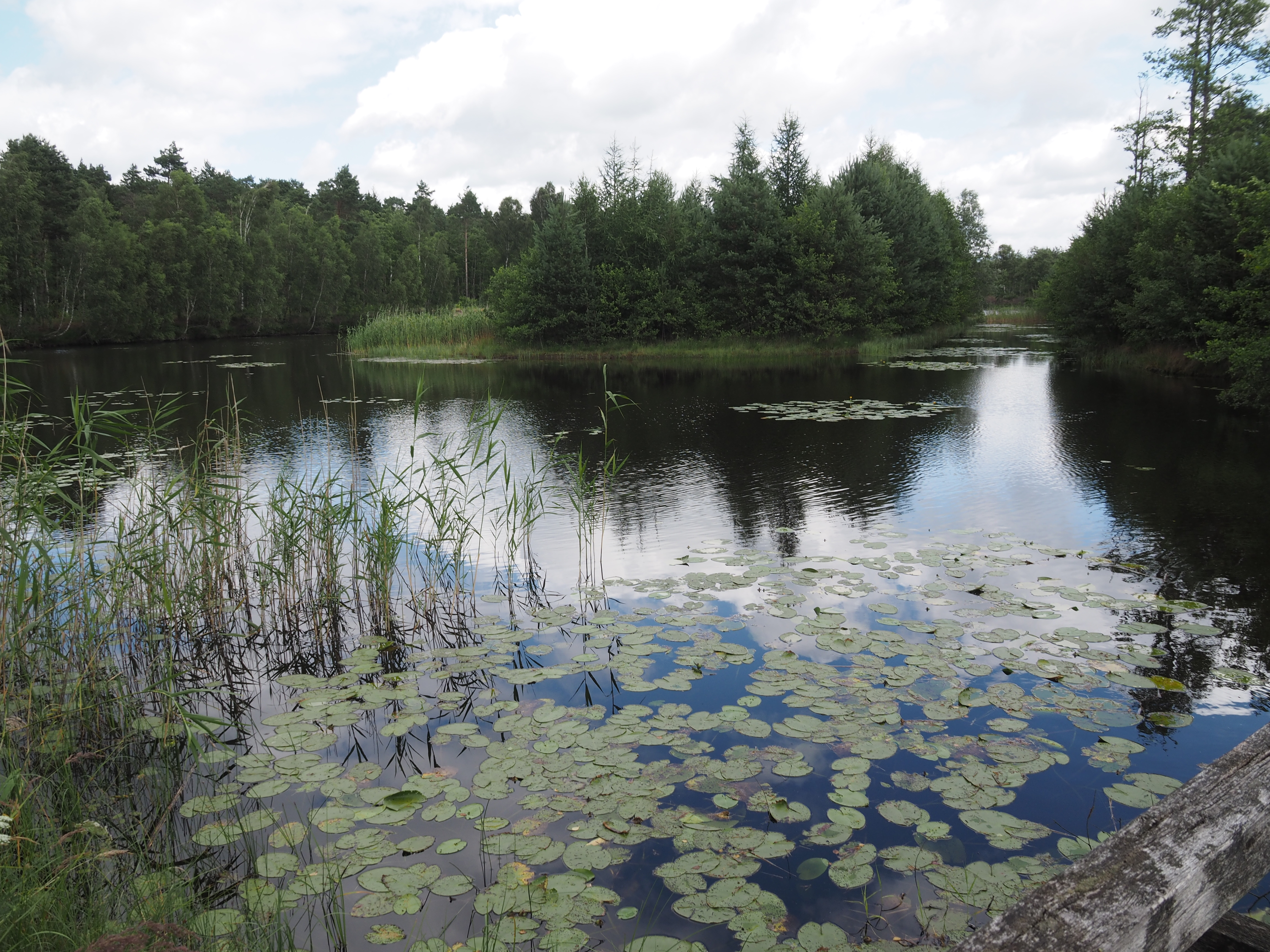 Der dritte der 4 Munoseen auf dem Truppenübungsplatz Munster-Nord